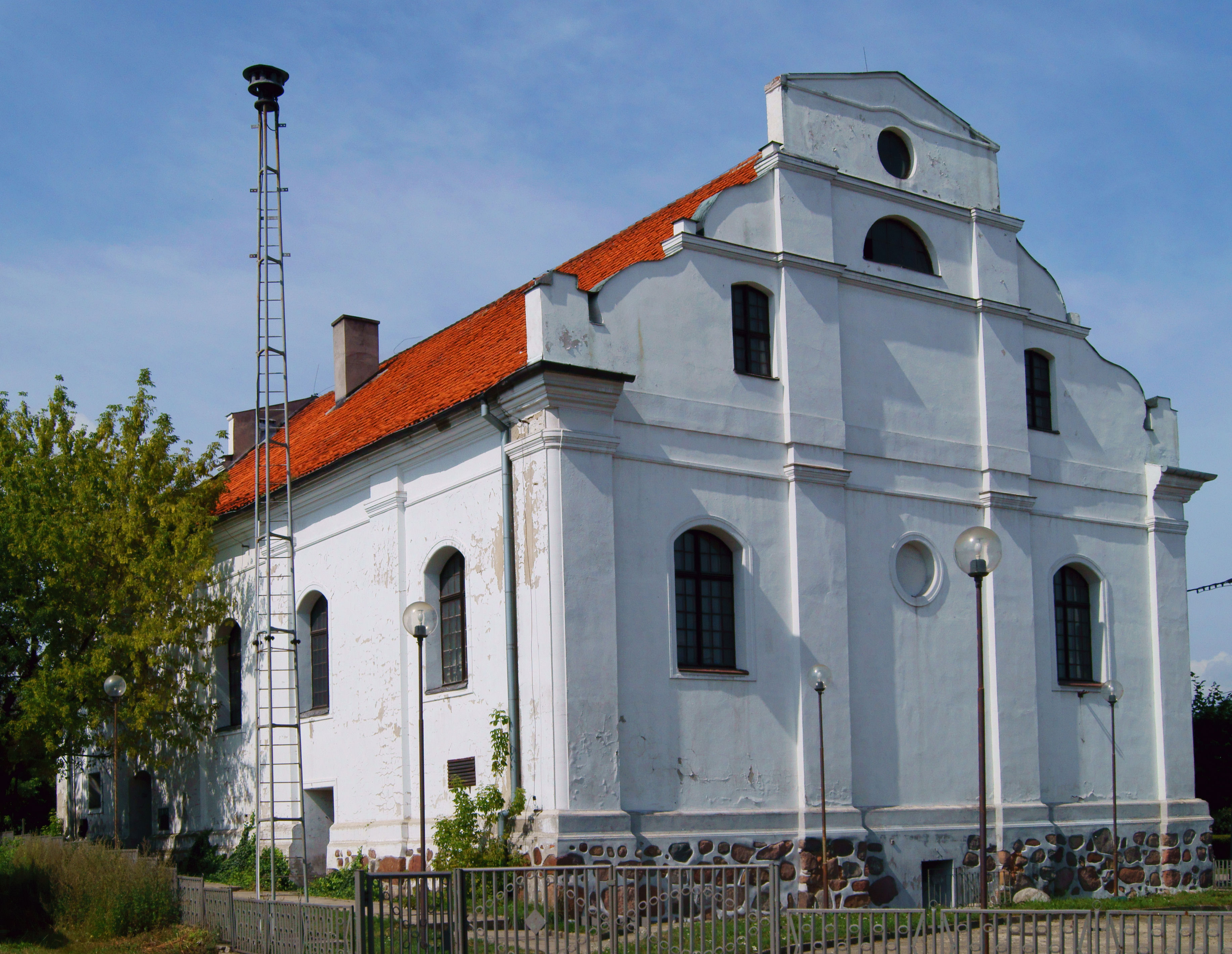 Bożniaca , k. XVIII miasto Lubraniec, ul. Brzeska 10 widok od tyłu